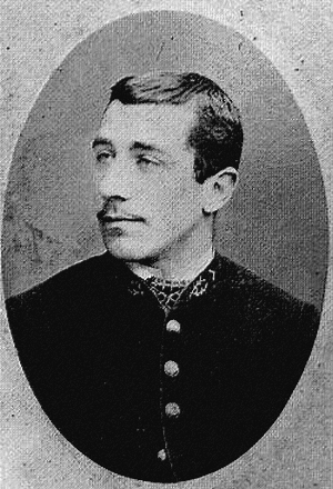 Photo-carte de visite, Alain étudiant, vers 1890.